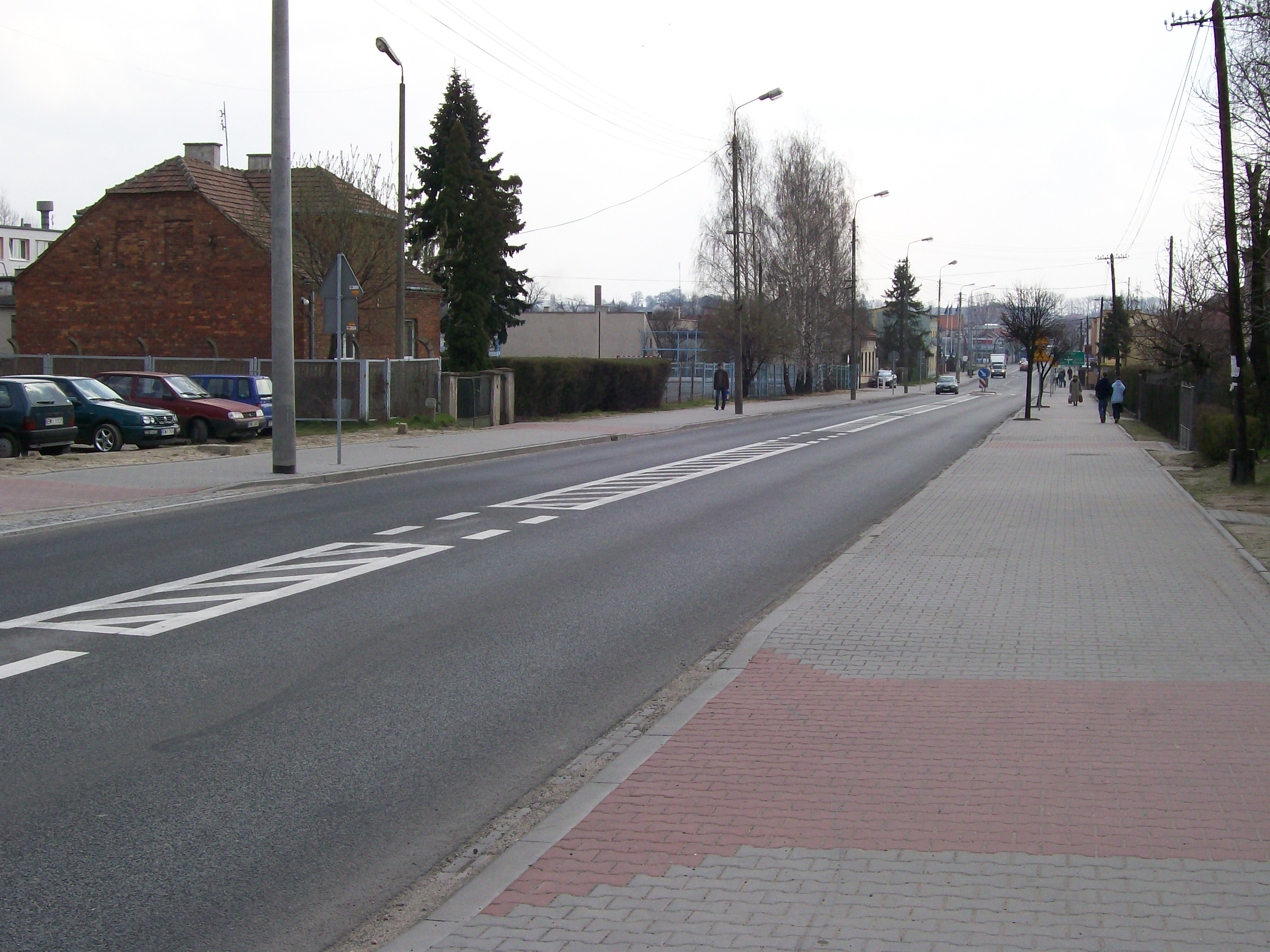 Ulice Sieradzka ve Wieluni, Polsko